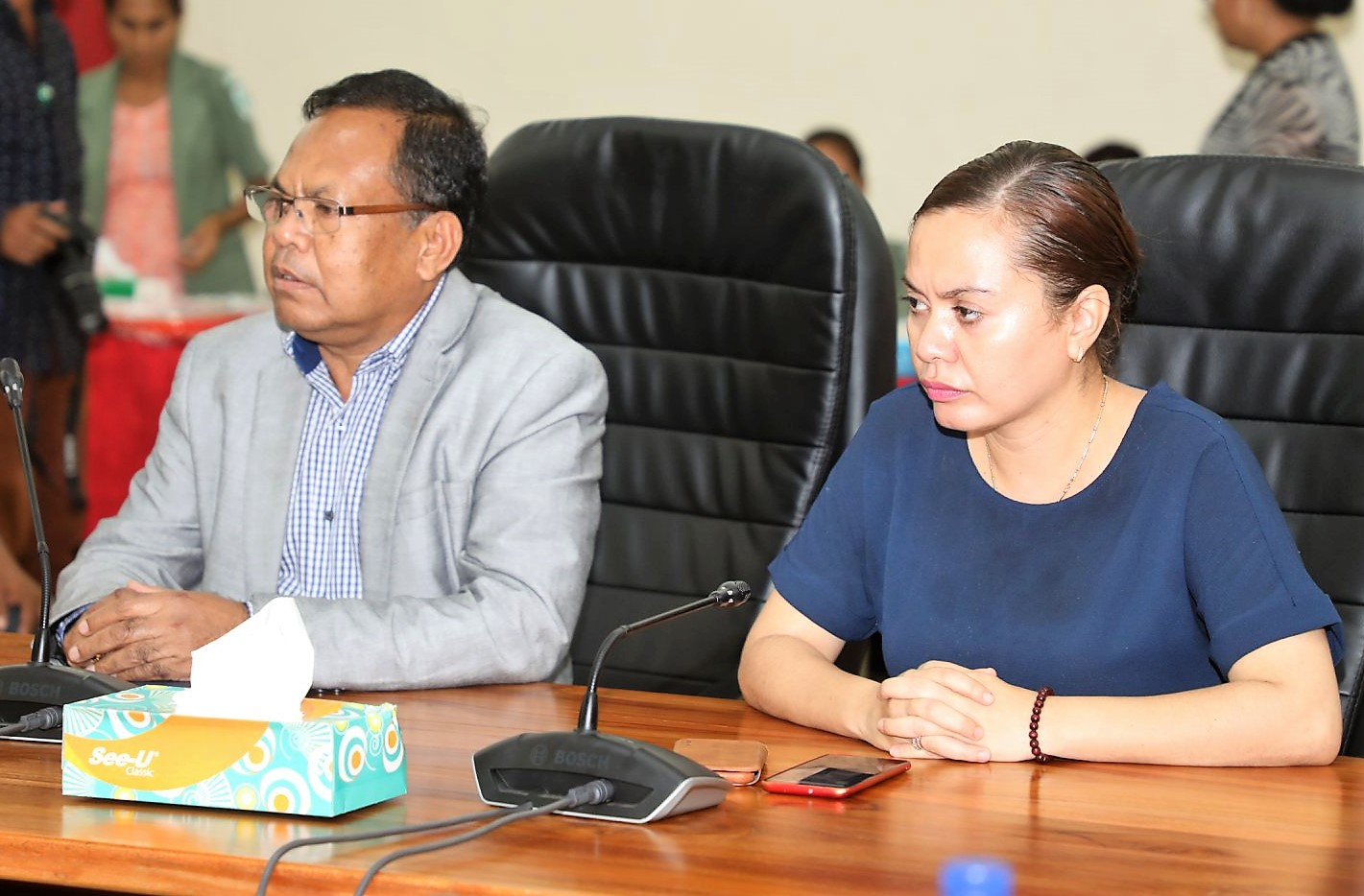 Bonifácio dos Reis und Élia António de Araújo dos Reis Amaral, stellvertretende Gesundheitsminister Osttimors